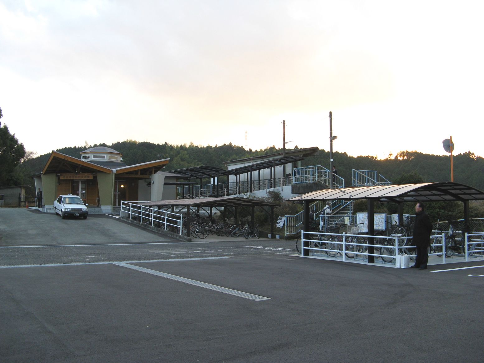 牟岐線阿波海南駅